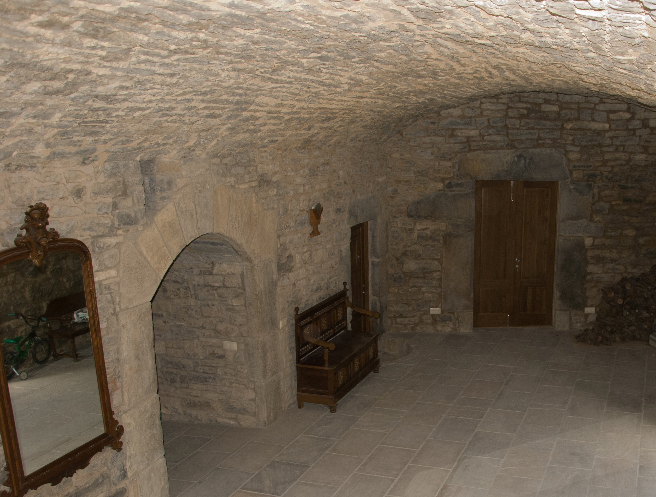 Zaguán desde el que se accede a diferentes estancias del palacio de los Mur de Formigales.